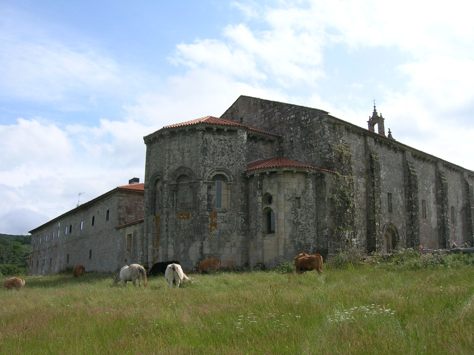 Cabeceira da igrexa do Mosteiro de Santa María de Acibeiro